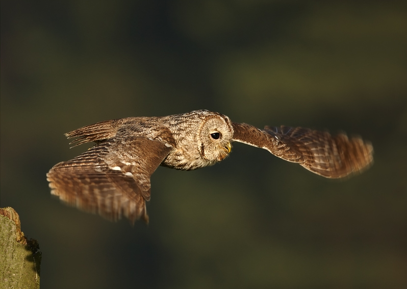 Strix aluco, Žďárské vrchy, CZ